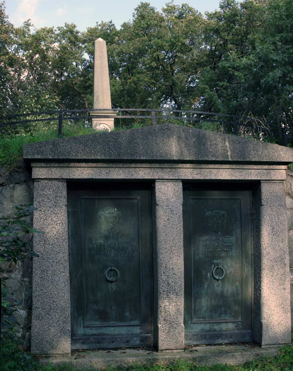 Georg Frederik Zytphen-Adeler's grave